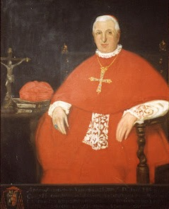 Cardenal José María de Cos y Macho, Arzobispo de Valladolid. Lienzo de la Sacristía de la Catedral de Valladolid.